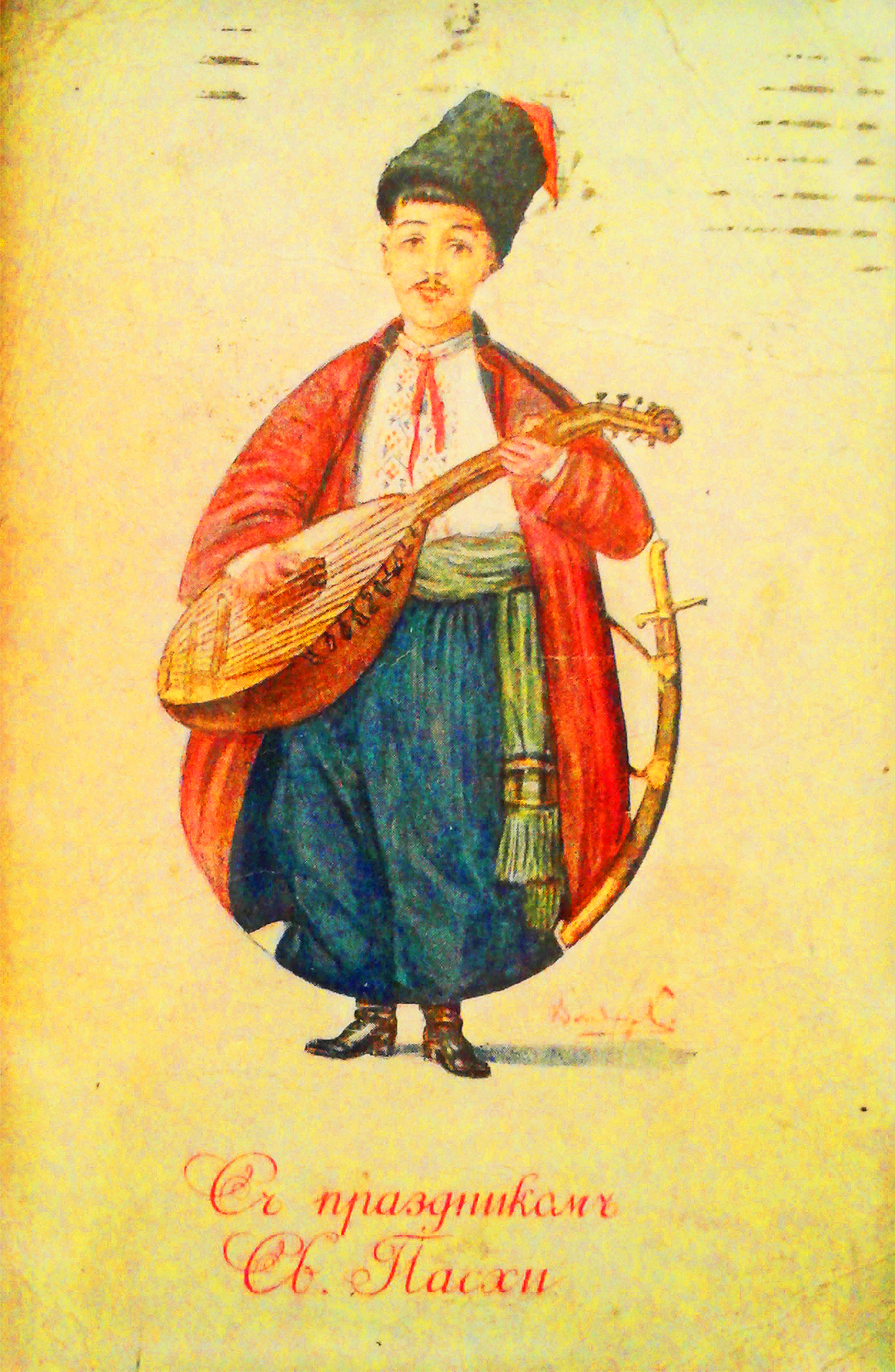 Великодня листівка в українському стилі